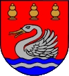 Das Wappen wurde am 14. August 2007 vom Innenministerium Mecklenburg-Vorpommern genehmigt und unter der Nr. 316 der Wappenrolle von Mecklenburg-Vorpommern registriert.